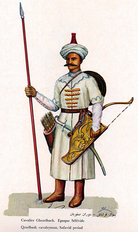 Soldat Qizilbash Origine: inconnu Utilisation: domaine public